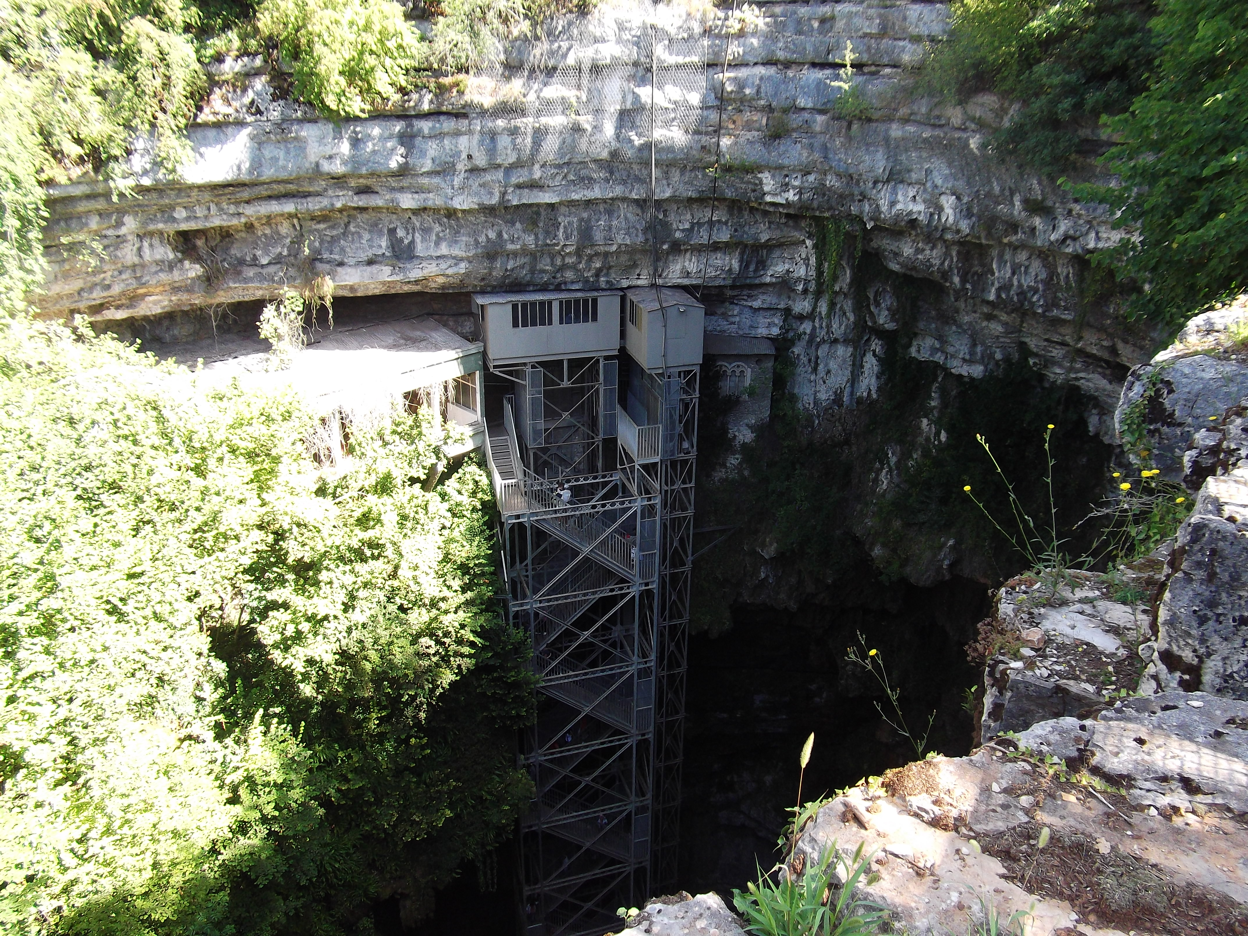 Le Gouffre de Padirac